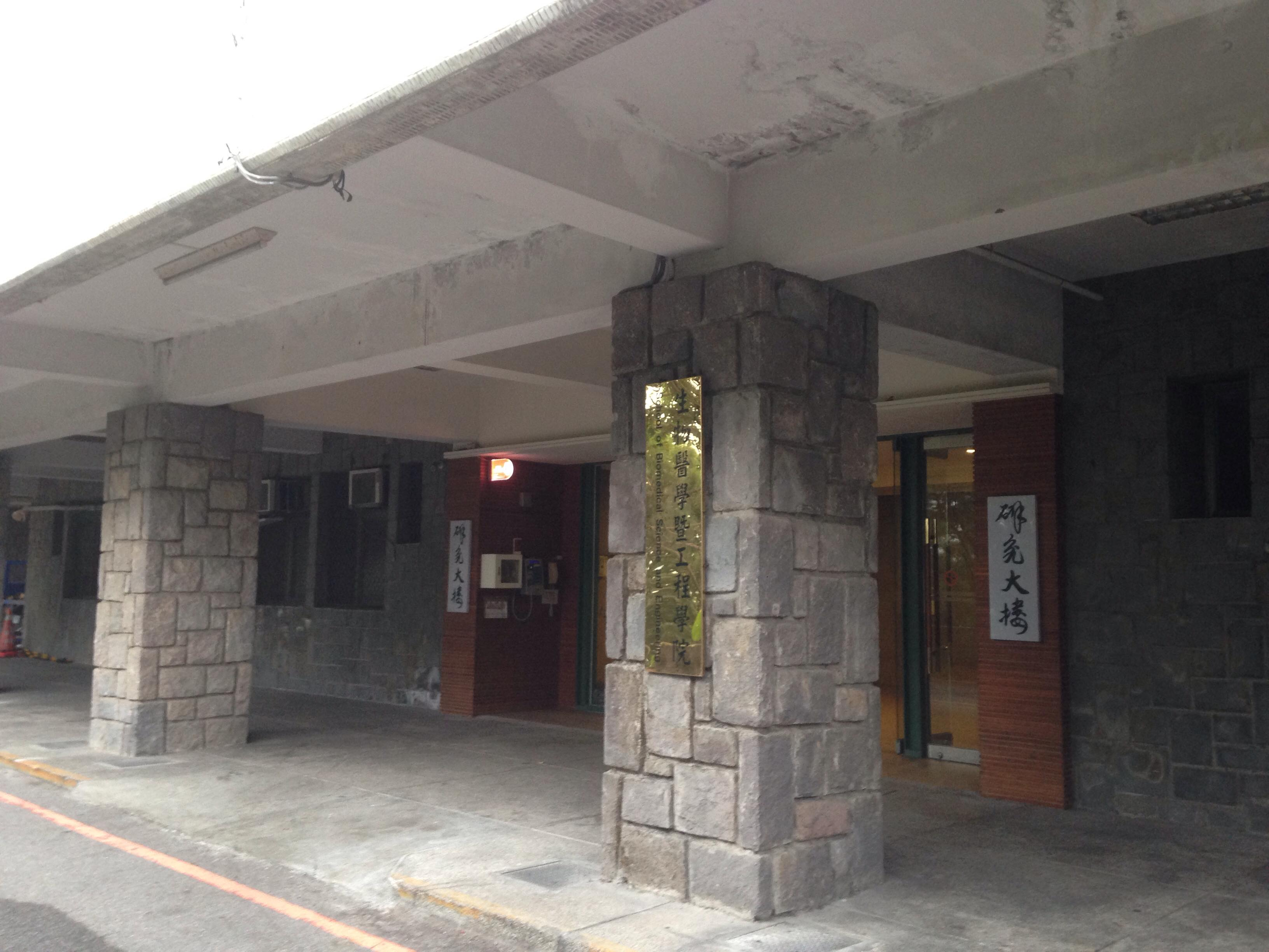 國立陽明大學研究大樓